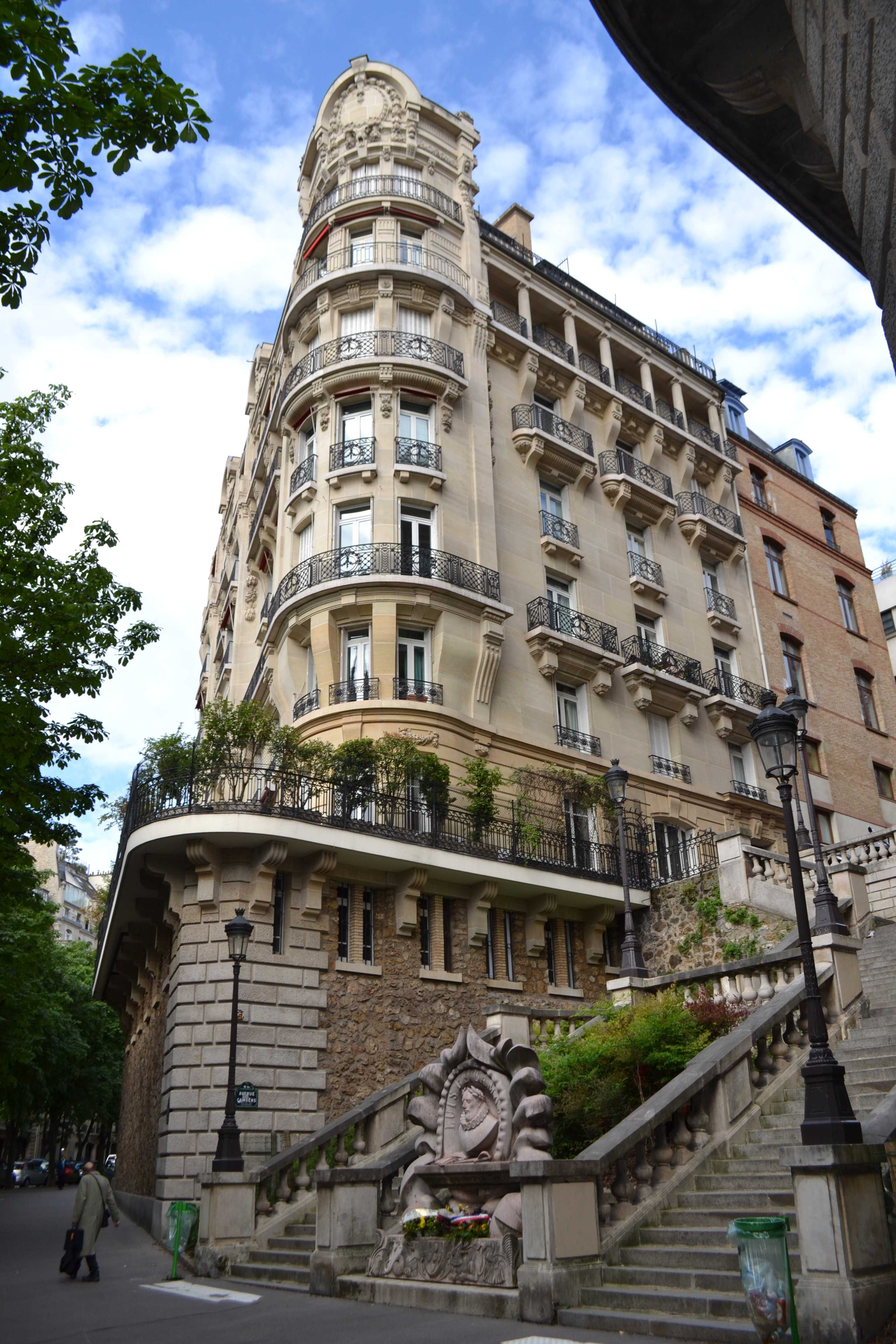 Immeuble du 1 avenue de Camoëns, Paris 16e. Architecte : Henri Duray. Date : 1912.